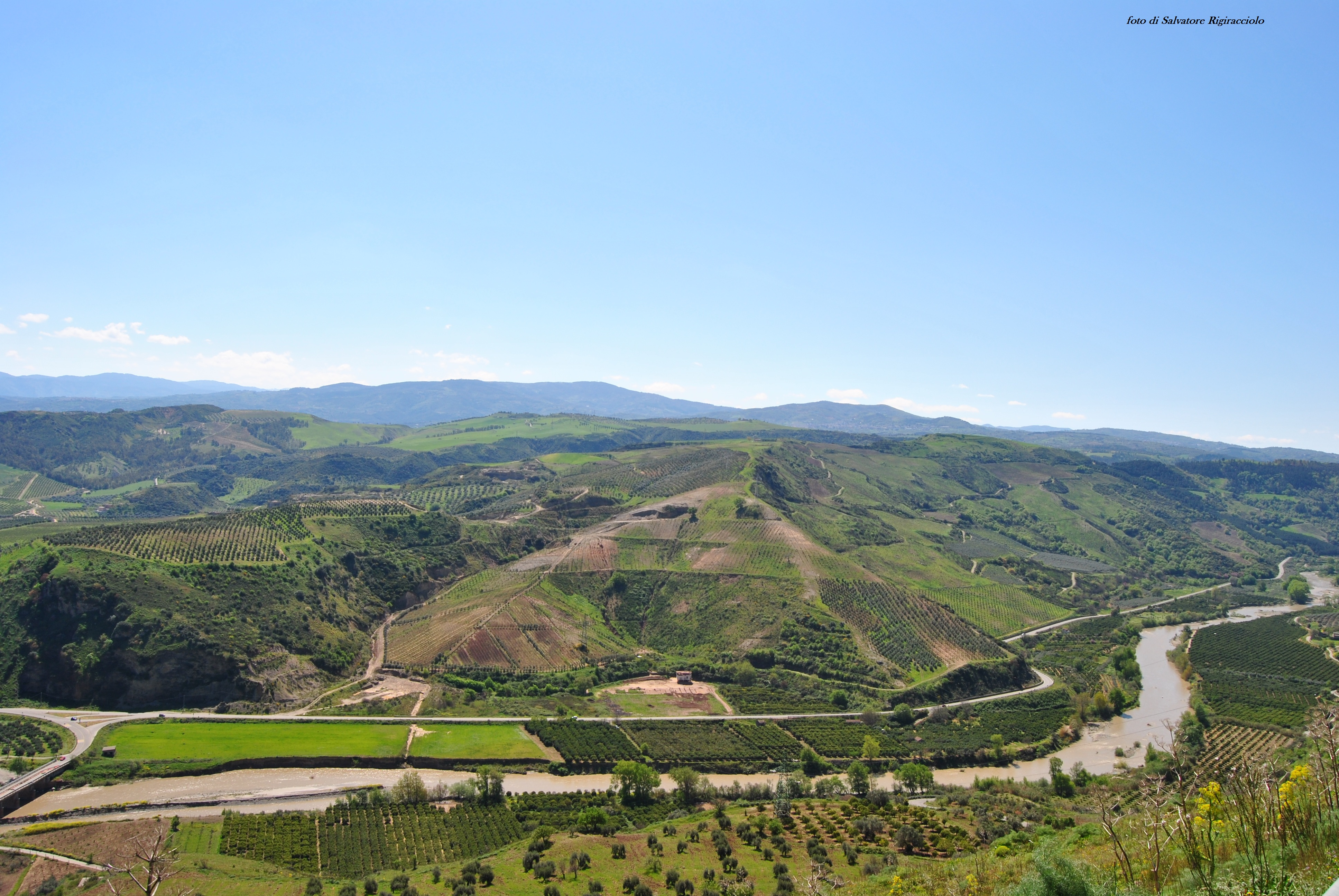 autore Salvatore Rigiracciolo, scattata il 08/04/2012, Panorama Terranovese, vista del Fiume Crati